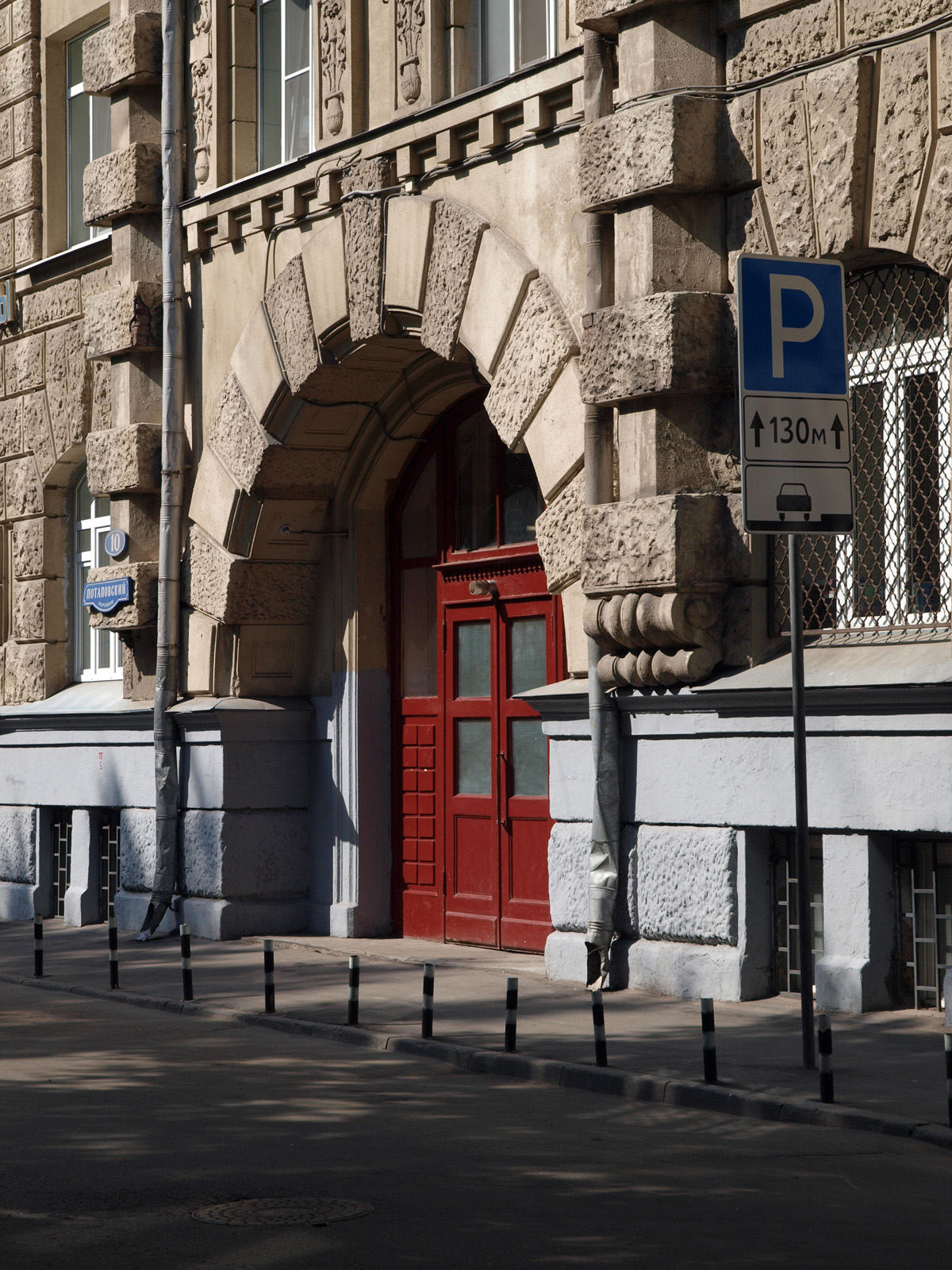 Potapovsky Lane, Moscow.